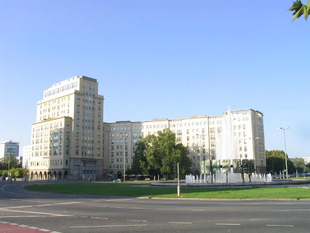 Description: Blick auf "Haus Berlin" Richtung Westen, Strausberger Platz. Bauzeit: 1951-1953. Architekten: Hermann Henselmann. Im Mittelpunkt des Kreisverkehrs steht der "Schwebende Ring" von Fritz Kühn aus dem Jahr 1967. View on Strausberger Platz in Berlin. Source: self-made. I release it into the public domain. Gryffindor 00:31, 10 March 2006 (UTC)